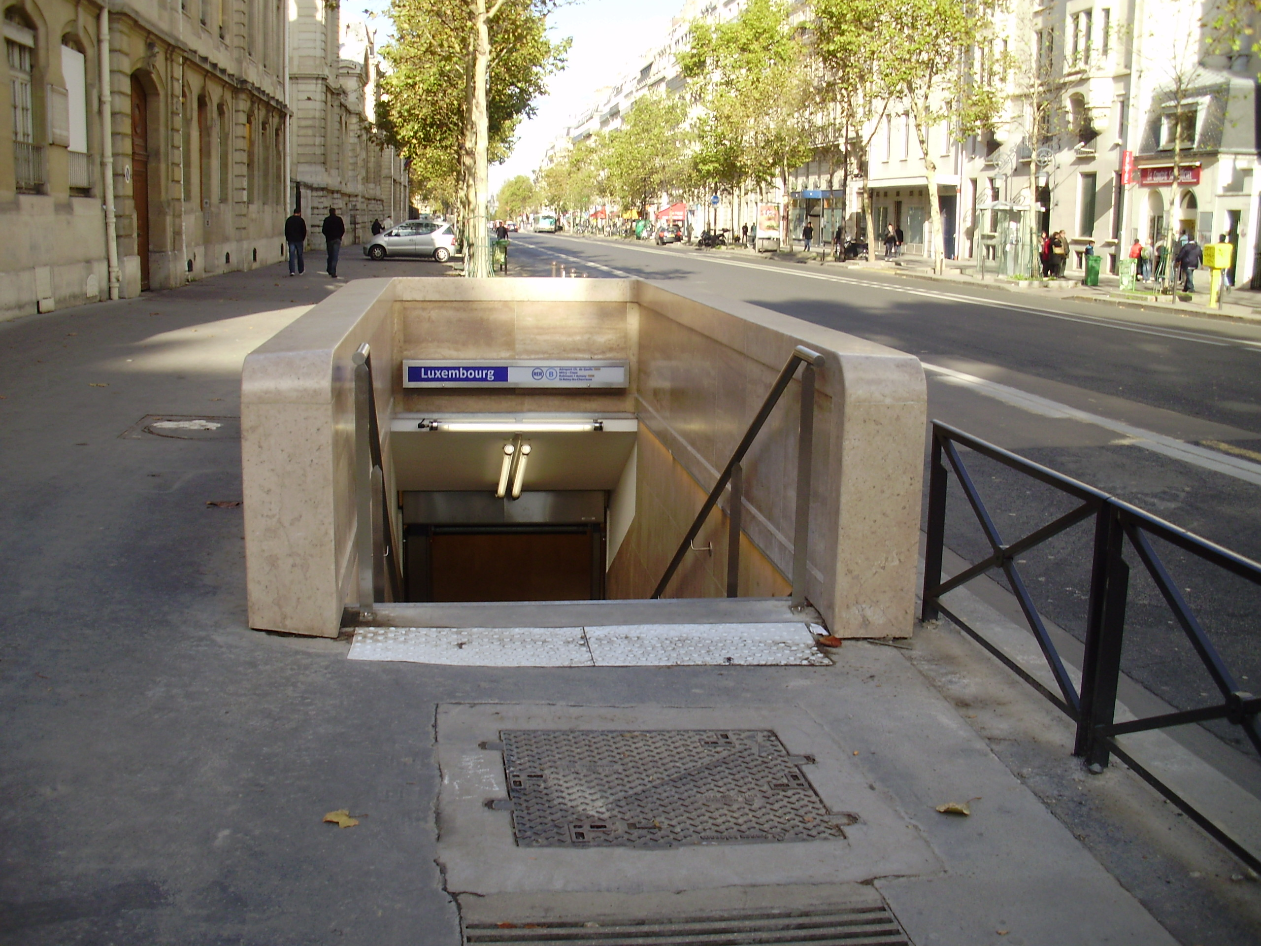 Gare du Luxembourg, à Paris (6e arrondissement), France : entrée située près de la rue Auguste-Comte sur le trottoir ouest du boulevard Saint-Michel.